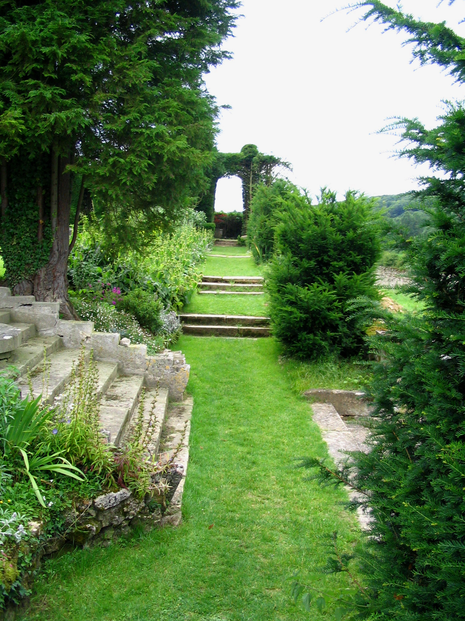 Chateau d'Ambleville, Val d'oise, France